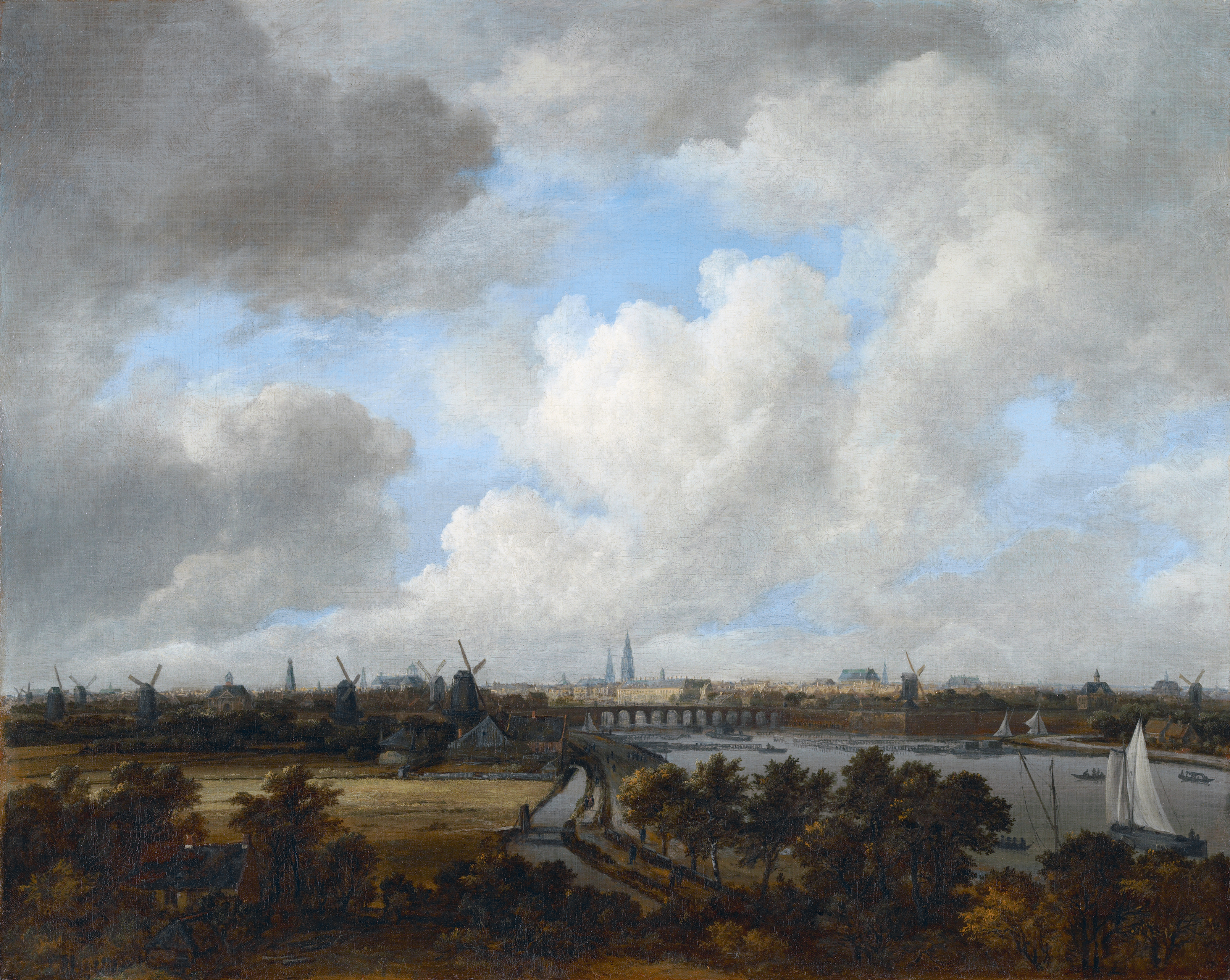 stadsgezicht; stadsgezicht Amsterdam; Amsteldijk; Amstel; Hoge sluis; Utrechtse Poort; Westerkerkstoren; Paleis op de Dam; Zuiderkerkstoren; Oudekerkstoren; Weesperpoort; Oosterkerkstoren